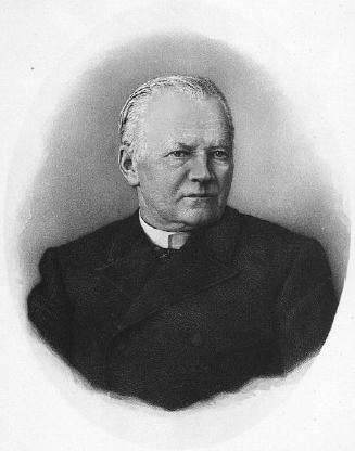 М.Н. Островский (1827 - 1901) - русский государственный деятель